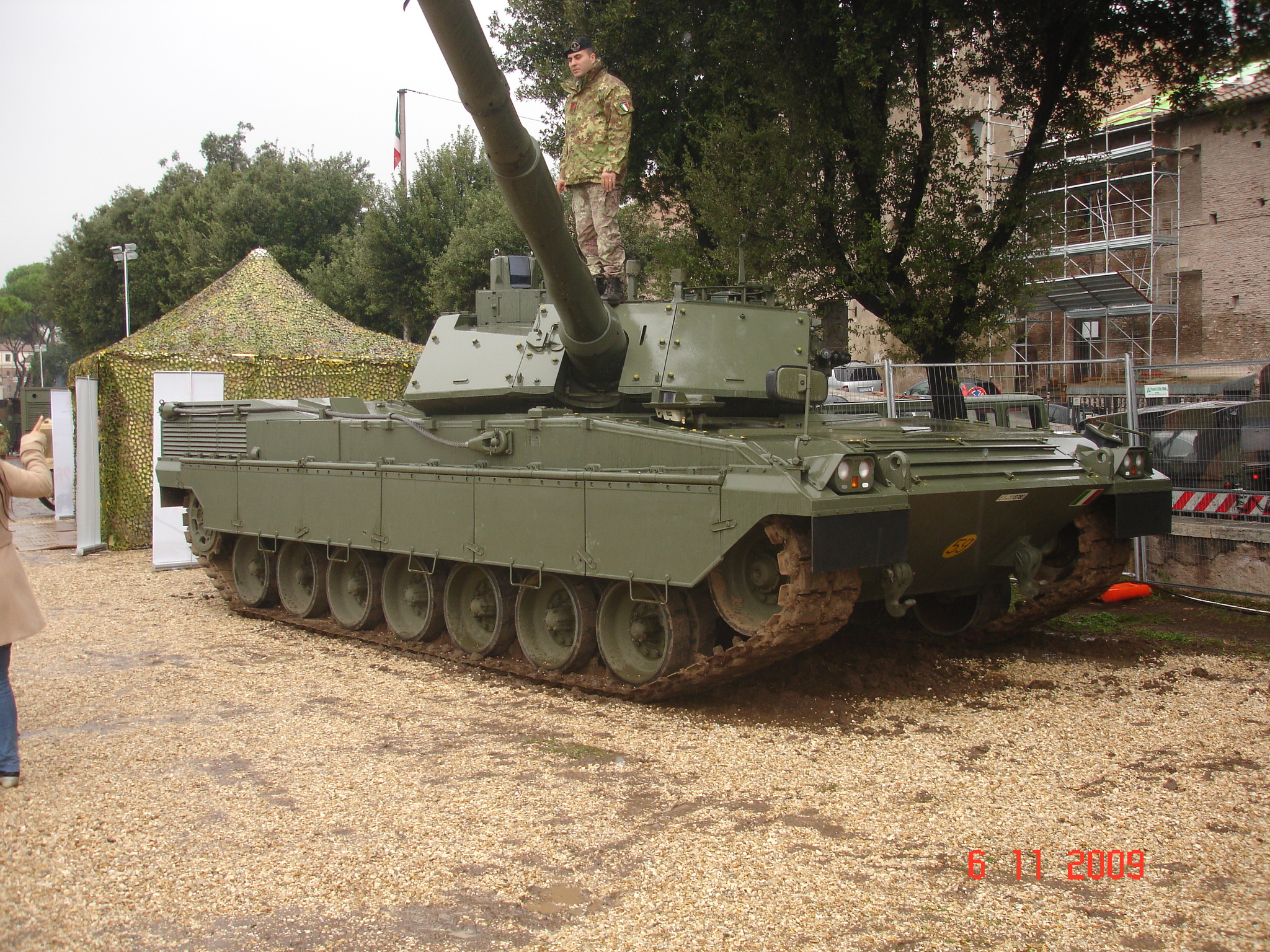 Carro armato esposto al circo massimo.